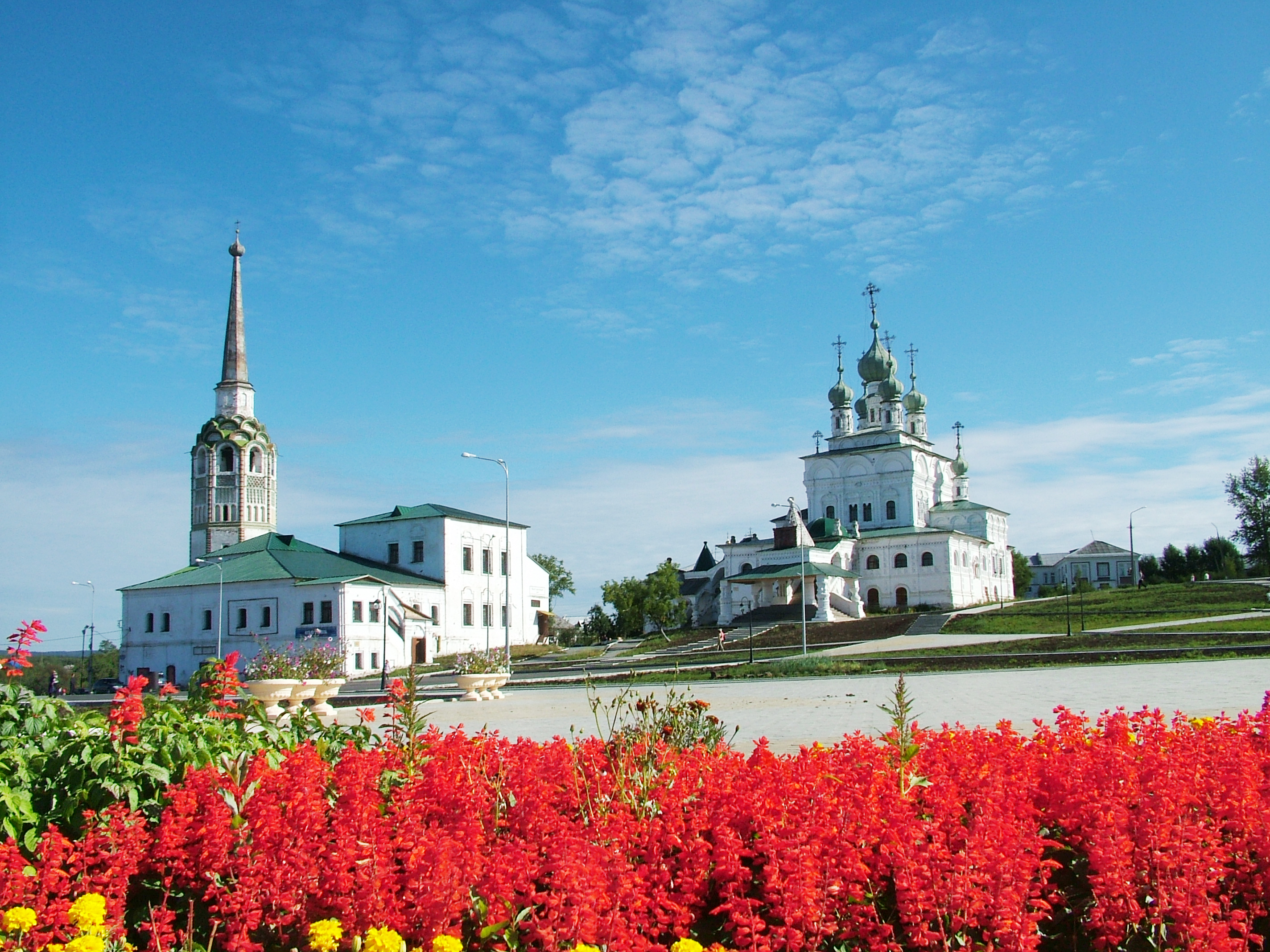 Исторический центр города Соликамск